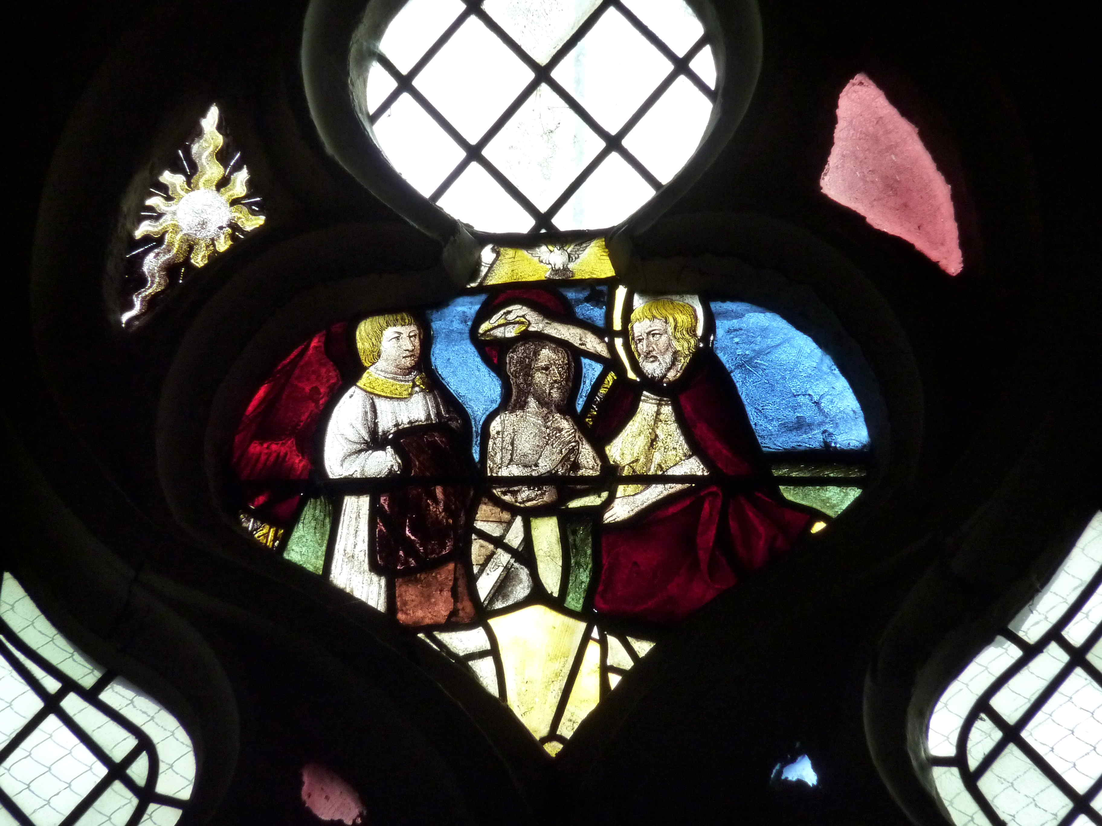 Katholische Kirche Notre-Dame-en-sa-Nativité in Puellemontier im Département Haute-Marne (Champagne-Ardenne/Frankreich), Bleiglasfenster, Fragment im Maßwerk aus dem 16. Jahrhundert; Darstellung: Taufe Jesu .